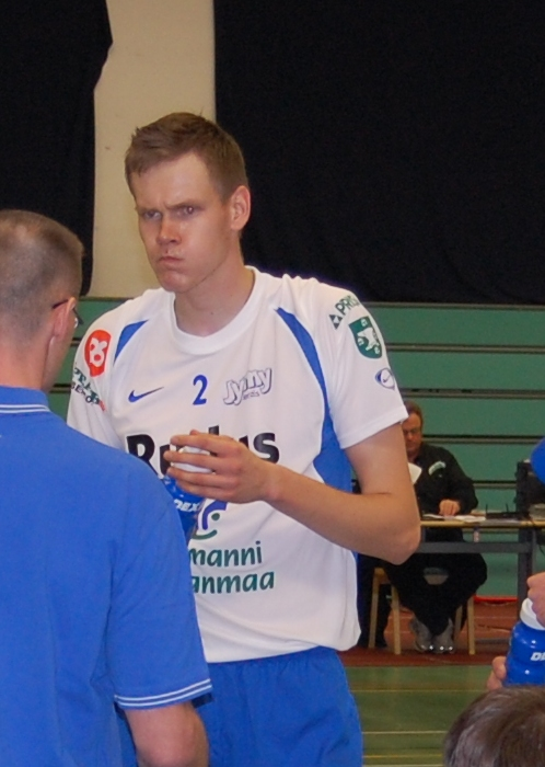 Nurmon Jymyn keskitorjuja Juha Järvenpää ottelun tiimellyksessä.